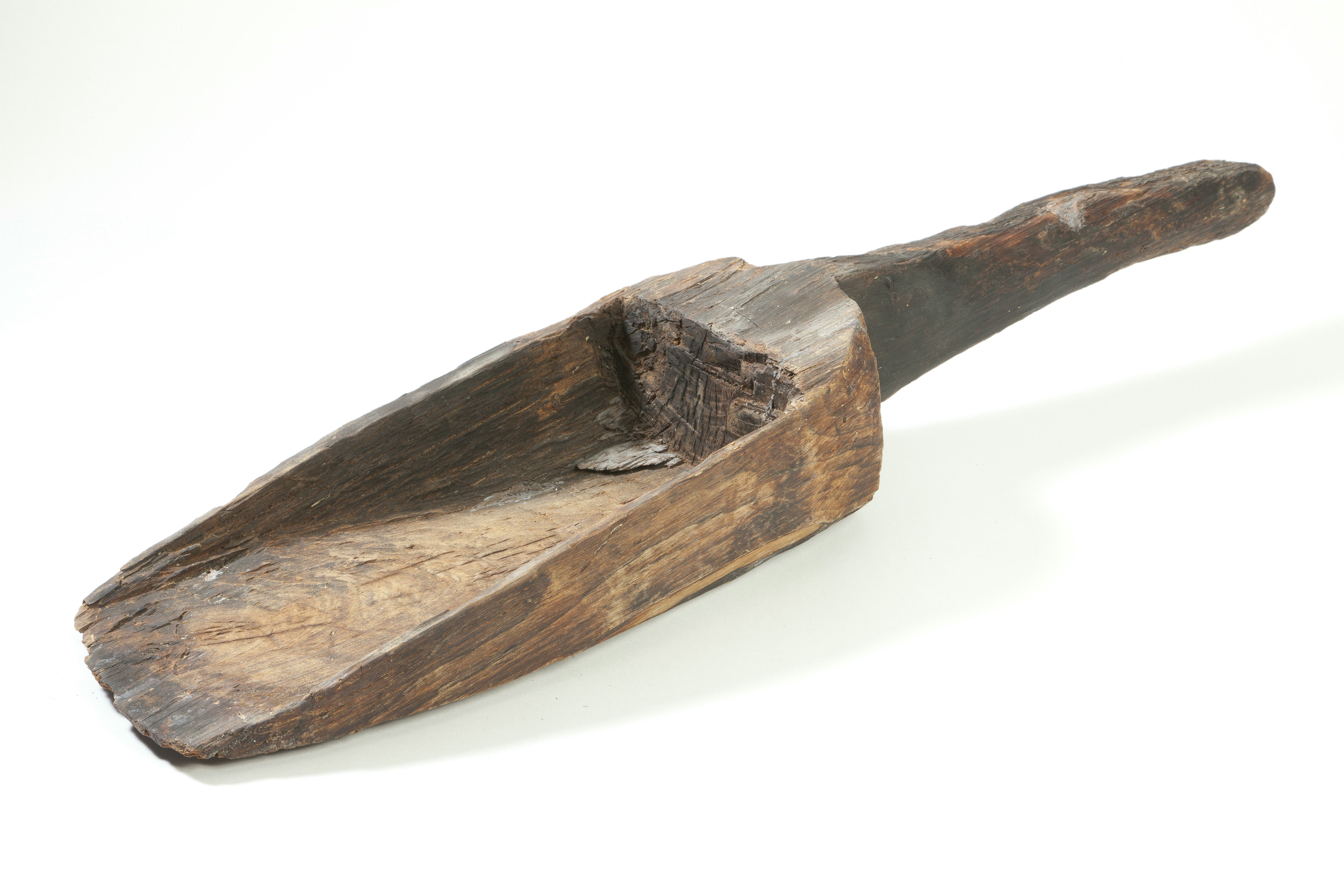 hoosschep Objectnummer:[MA]DMN1-194